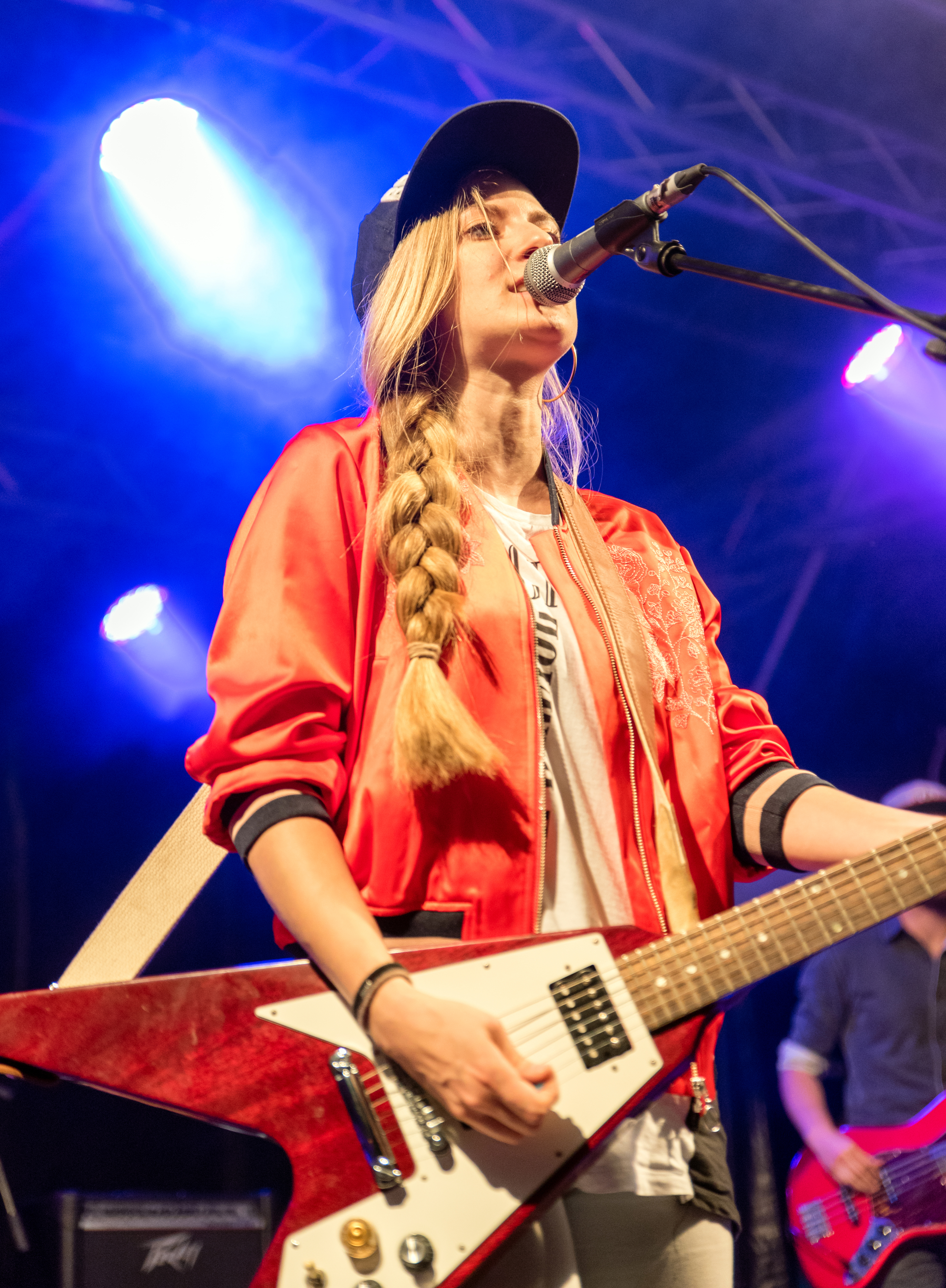 Kiddo Kat beim Wake Up Pi 2016